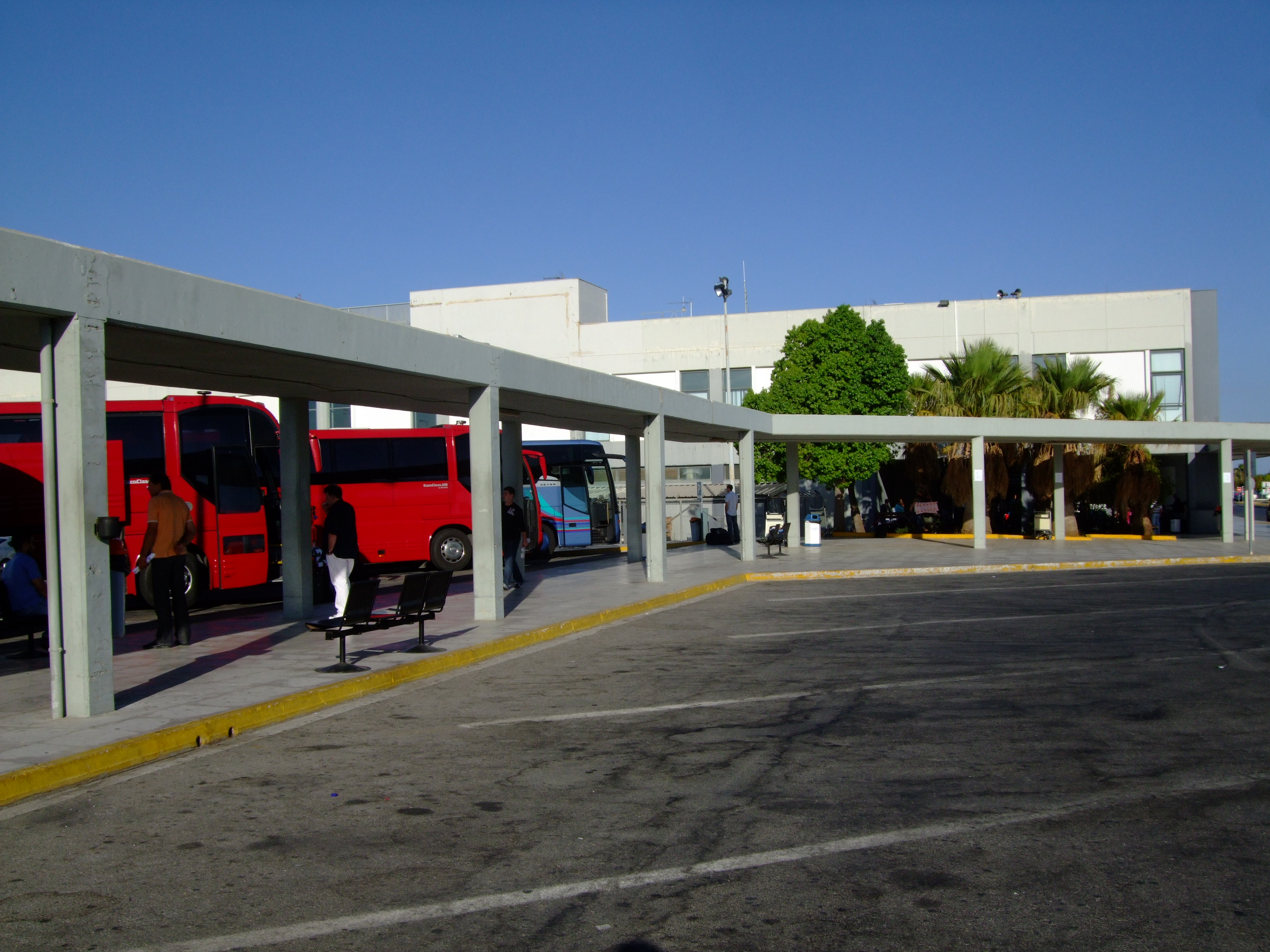 Budynek główny lotniska w Chanii.Parking dla autokarów.